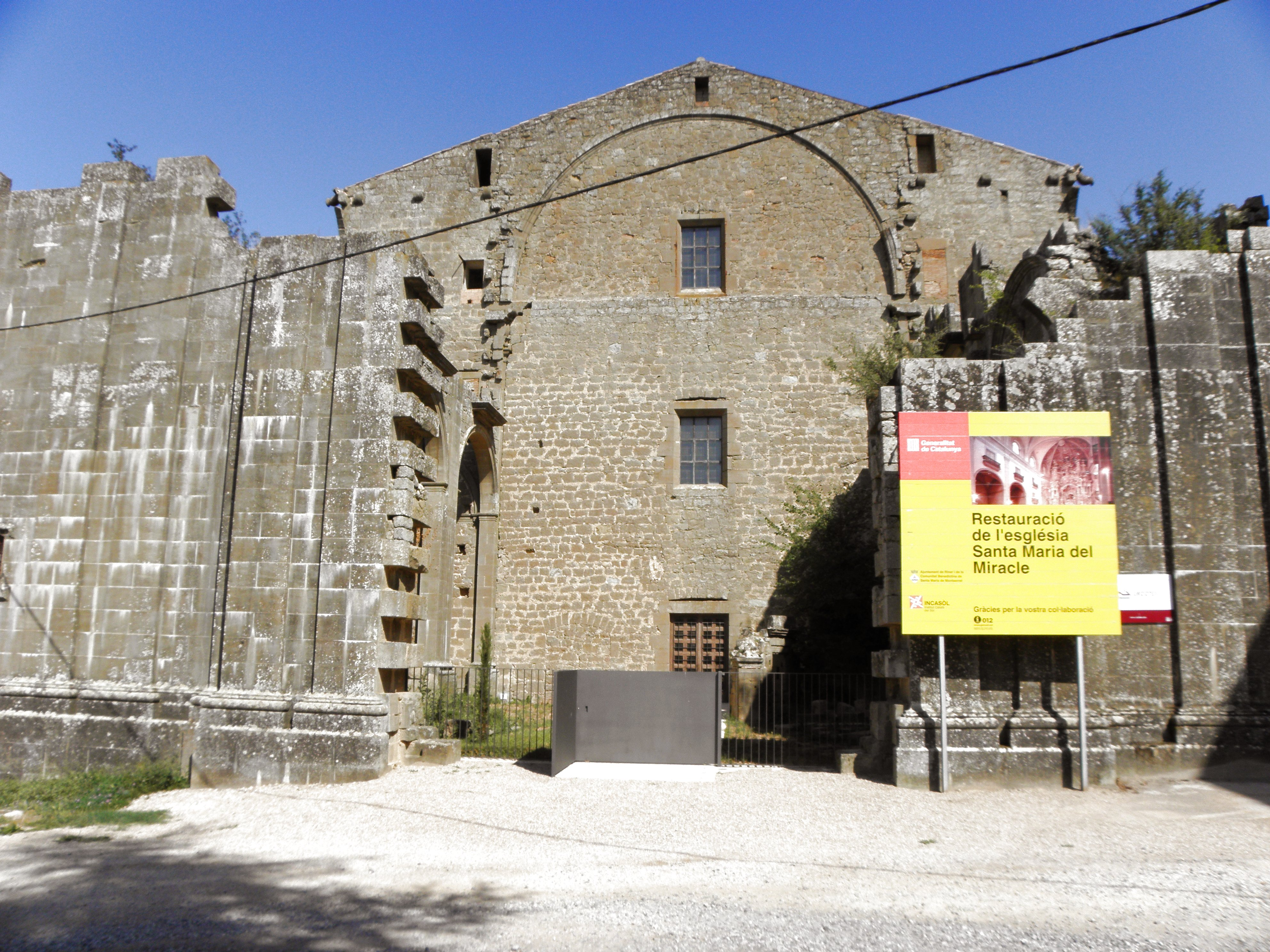 La façana de ponent de l'església del Santuari del Miracle (Riner, Solsonès)